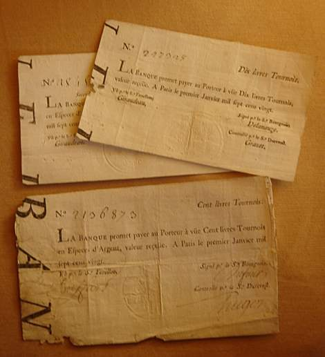 Billets de la Banque royale a l'époque de John Law